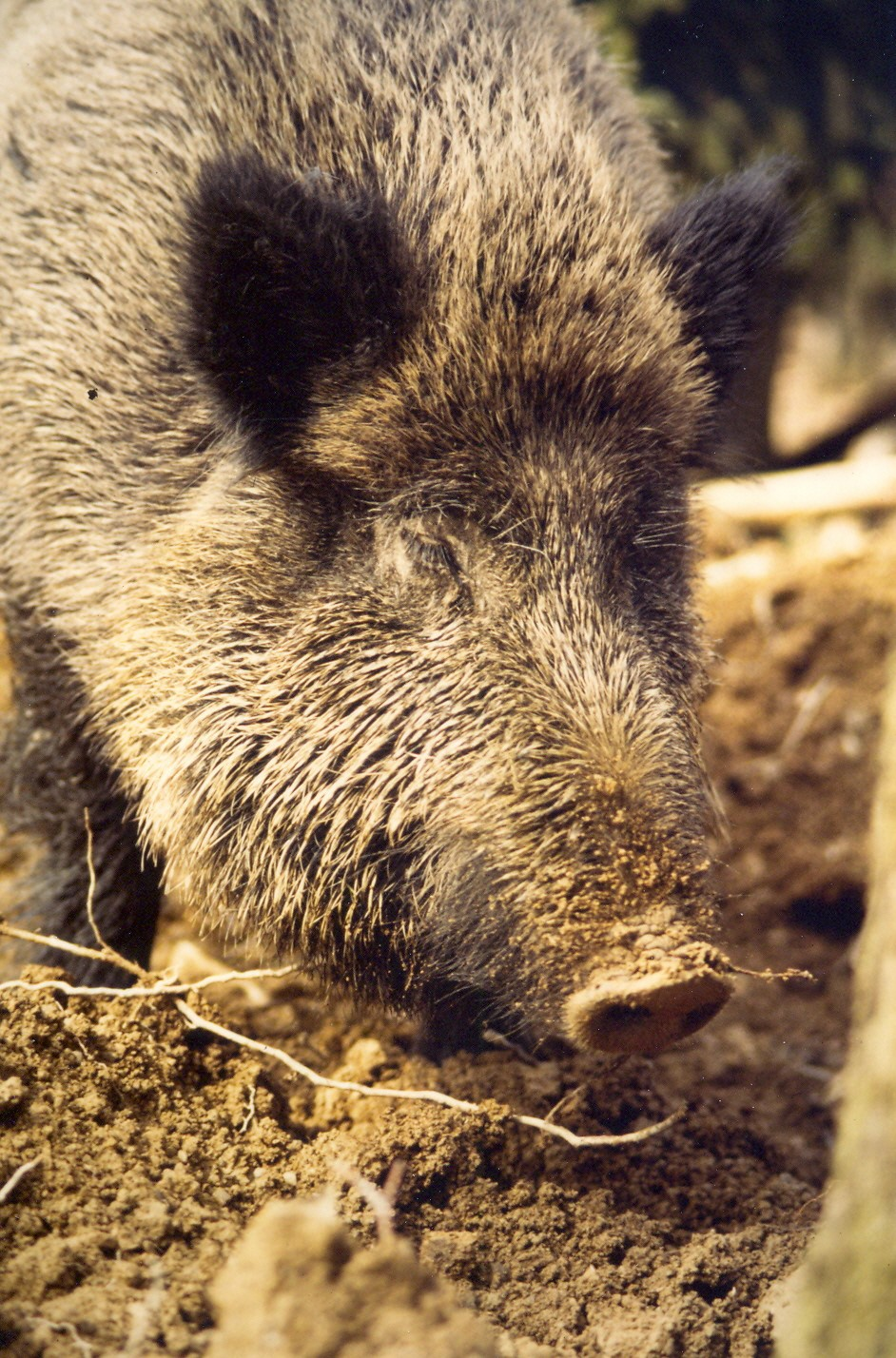 Bache im Gehege